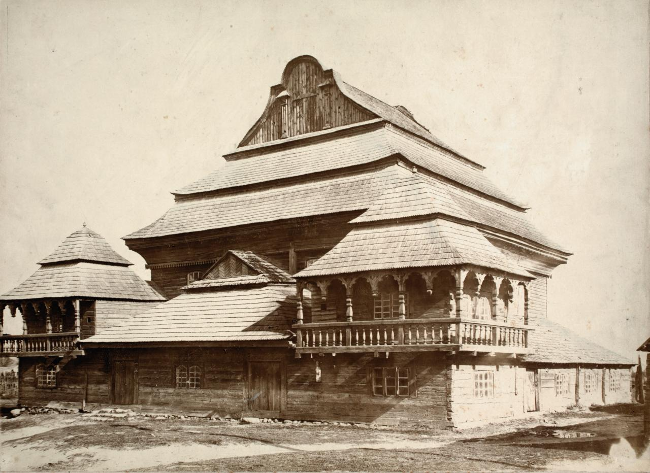 Беларуская (тарашкевіца): Воўпа (Voŭpa). Сынагога